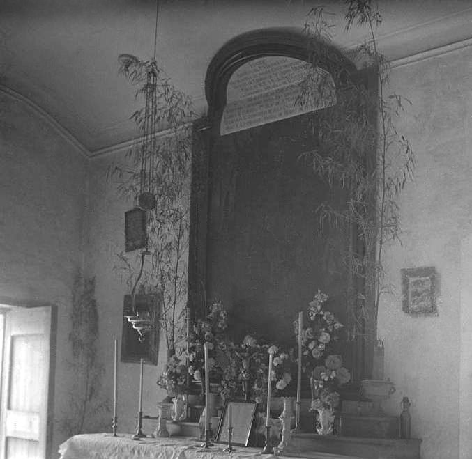 Sant Francesc de Can Codina. Josep Salvany i Blanch (1917)